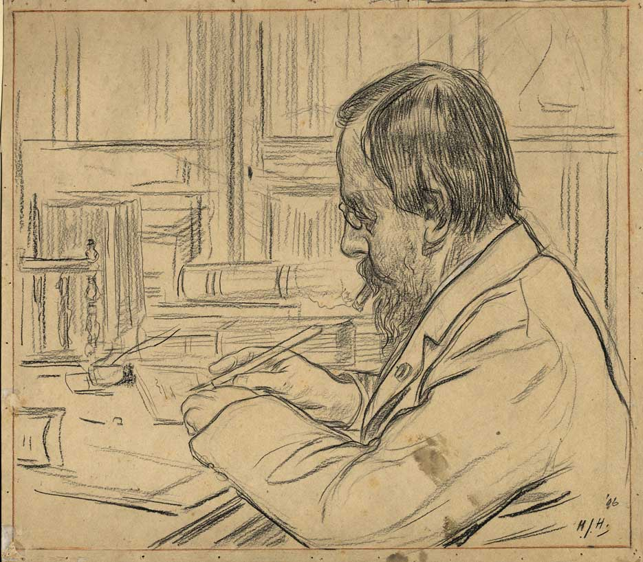 Jhr.mr. J.W.M. Schorer (1834-1903)